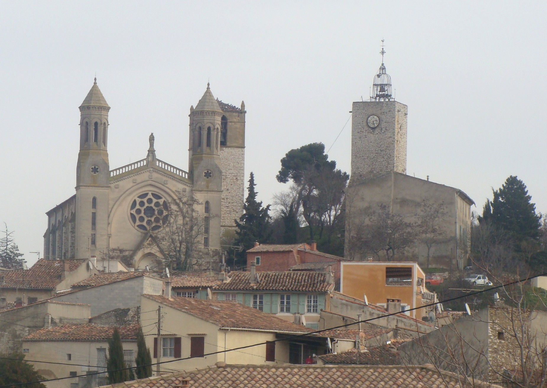 Rians (Var), l'église paroissiale et la tour-beffroi.